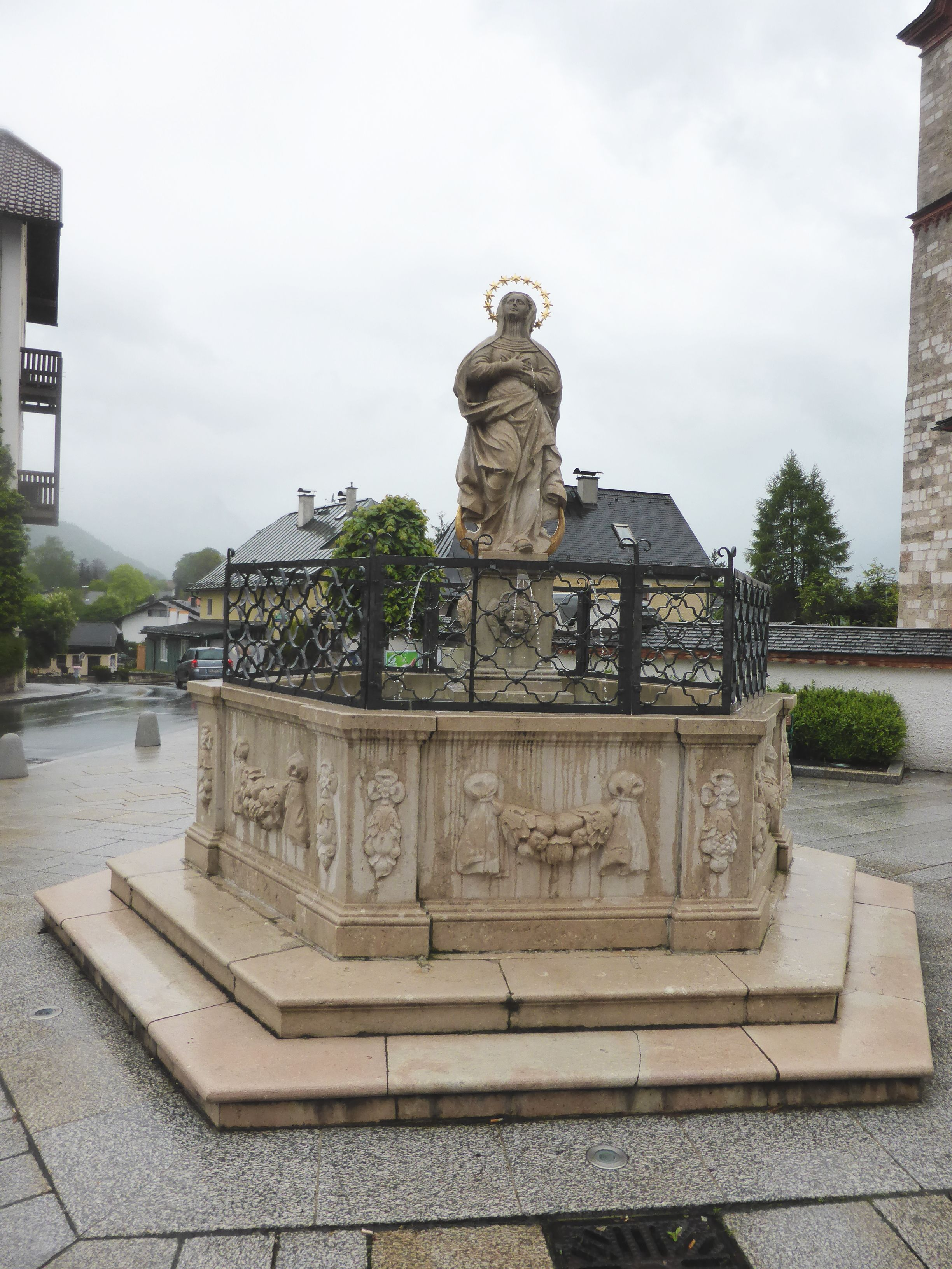 Marienbrunnen